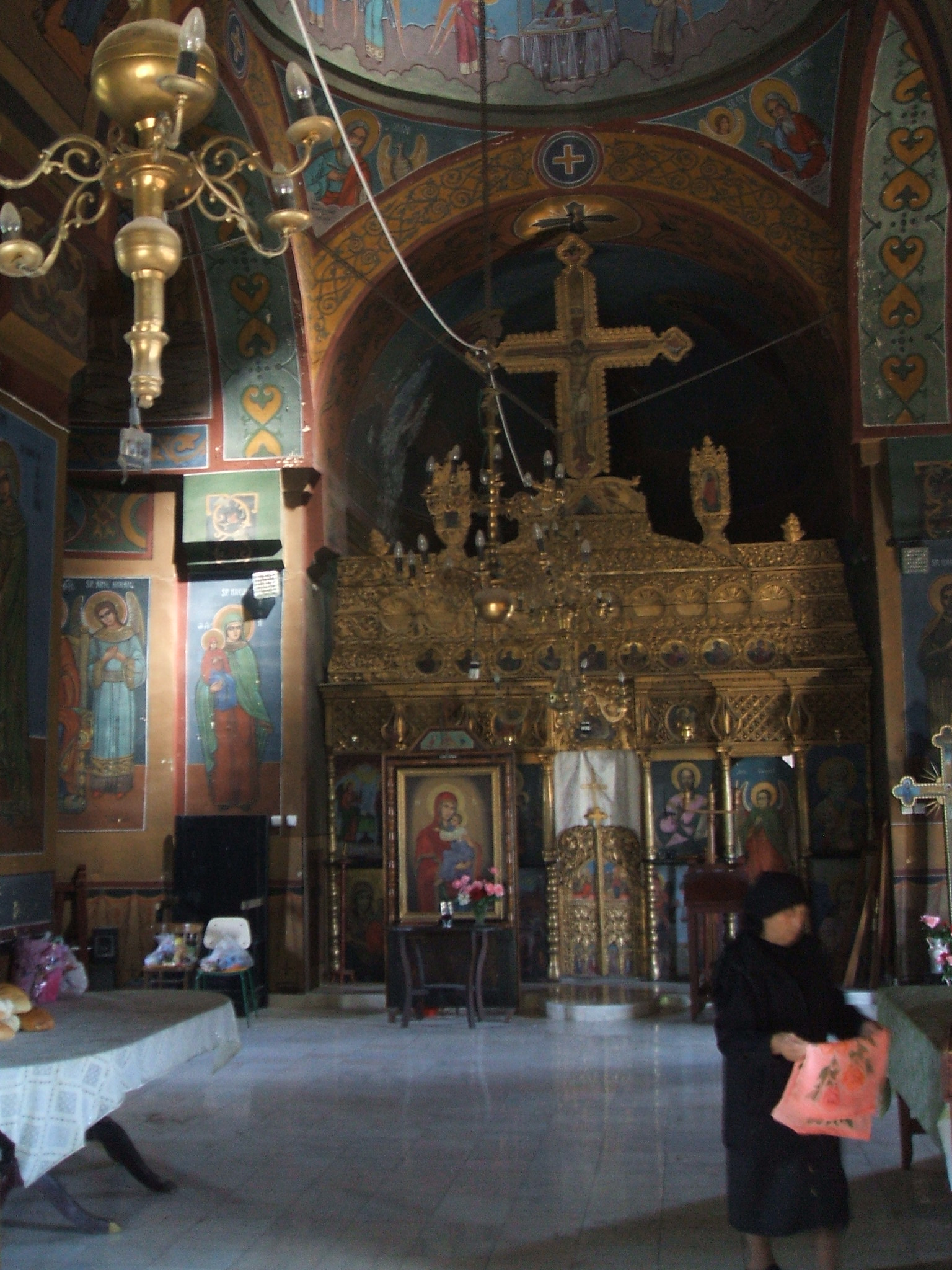 Biserica "Sfantul Ierarh Nicolae" din Rasa, construita intre 1936-1937 pe acelasi amplasament cu o biserica mai veche, din secolul XIX, de la care a preluat catapeteasma.